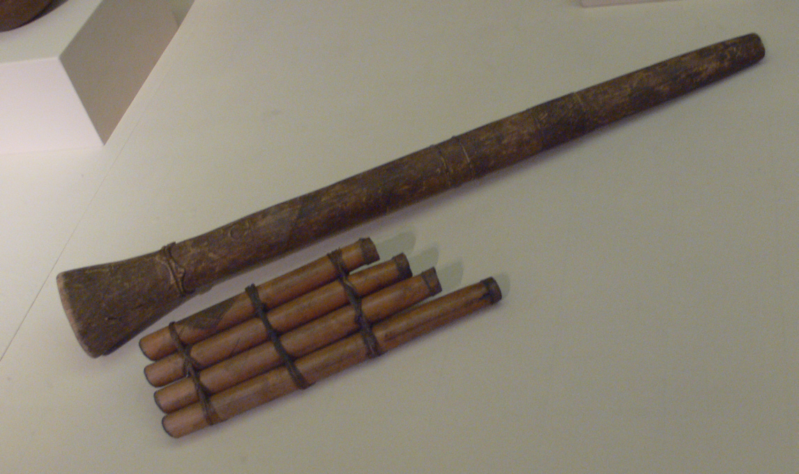 Stuttgart, Linden-Museum hinten: Trompete; Holz, Vili (Angola); Inv. Nr. 38362 vorne: Panflöte; Bambus und Pflanzenfasern; Yombe (Angola); Inv. Nr. 38365